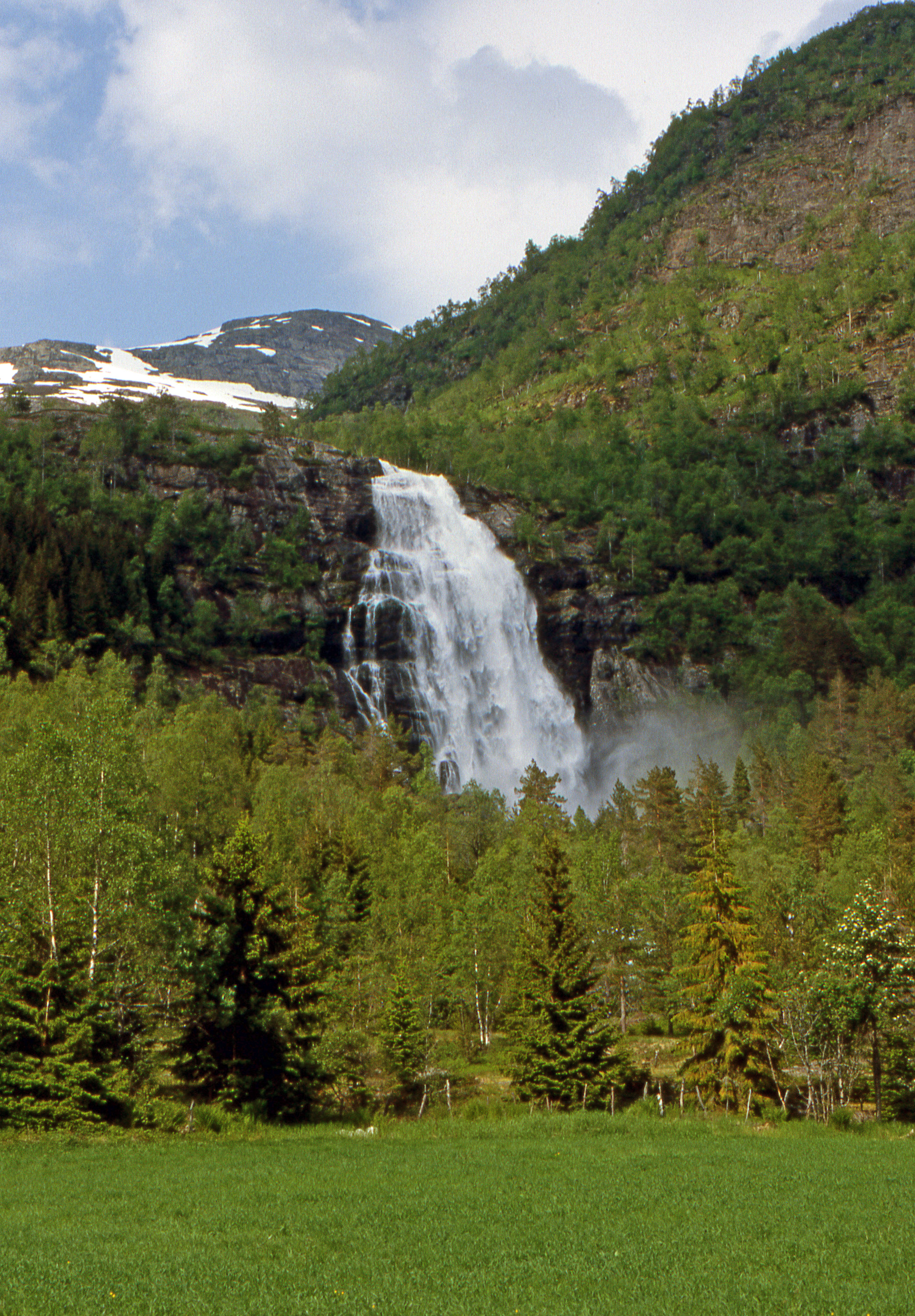 Espelandsfossen, Granvin. ESPELAND WATERFALLS Between Eidfjord and Voss, Norway - June 15, 1989